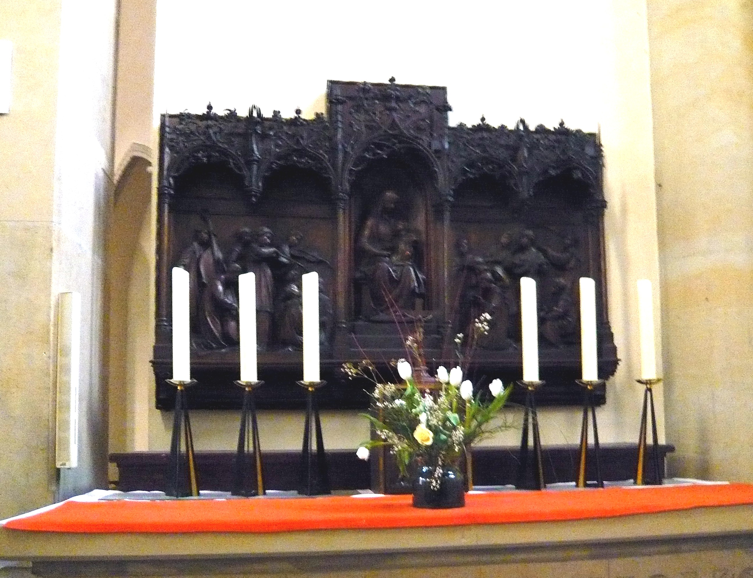 Kath. Kirche S. Corpus Christi, Prenzlauer Berg, Conrad-Blenkle-Straße